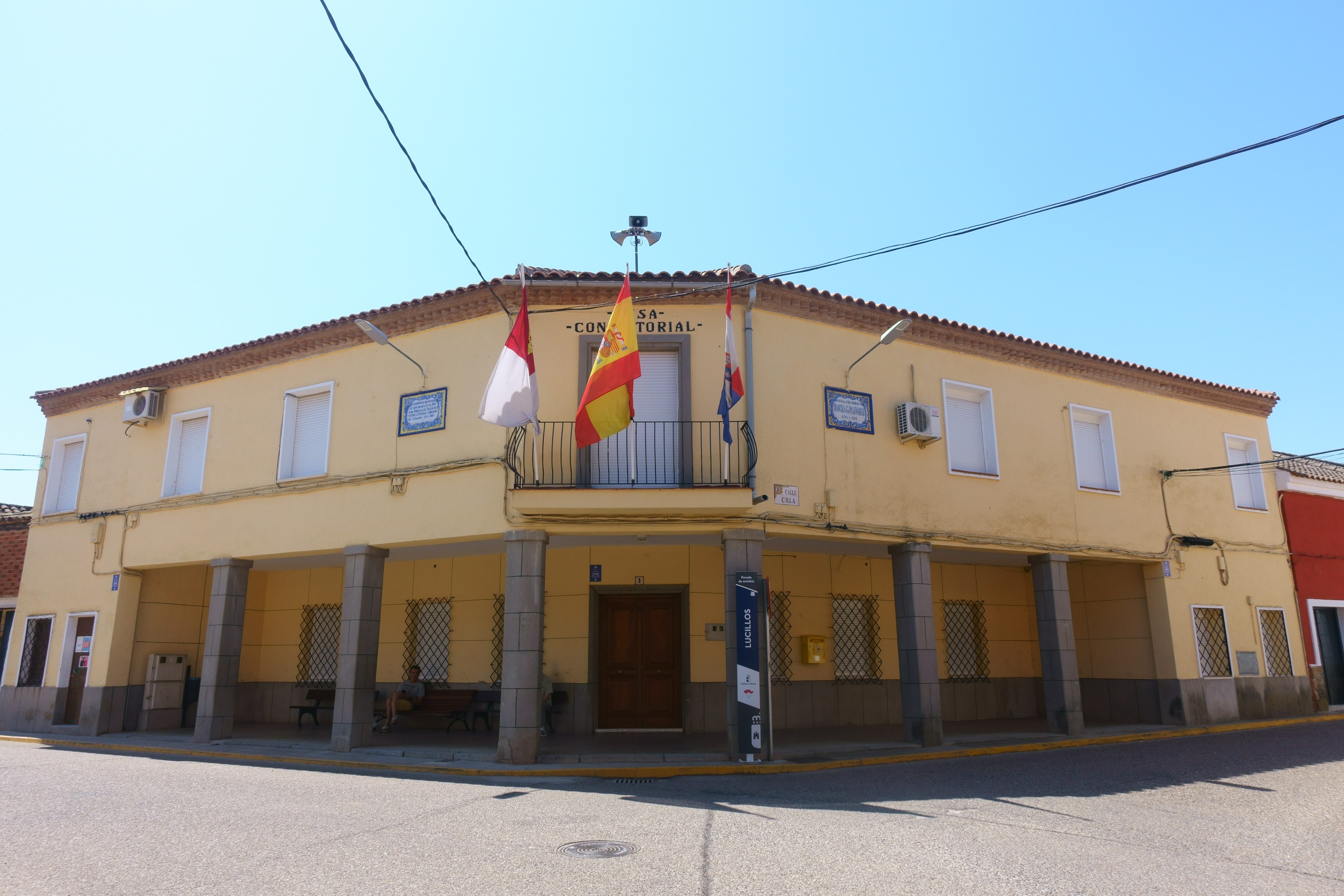 Casa consistorial de Lucillos (Toledo, España).